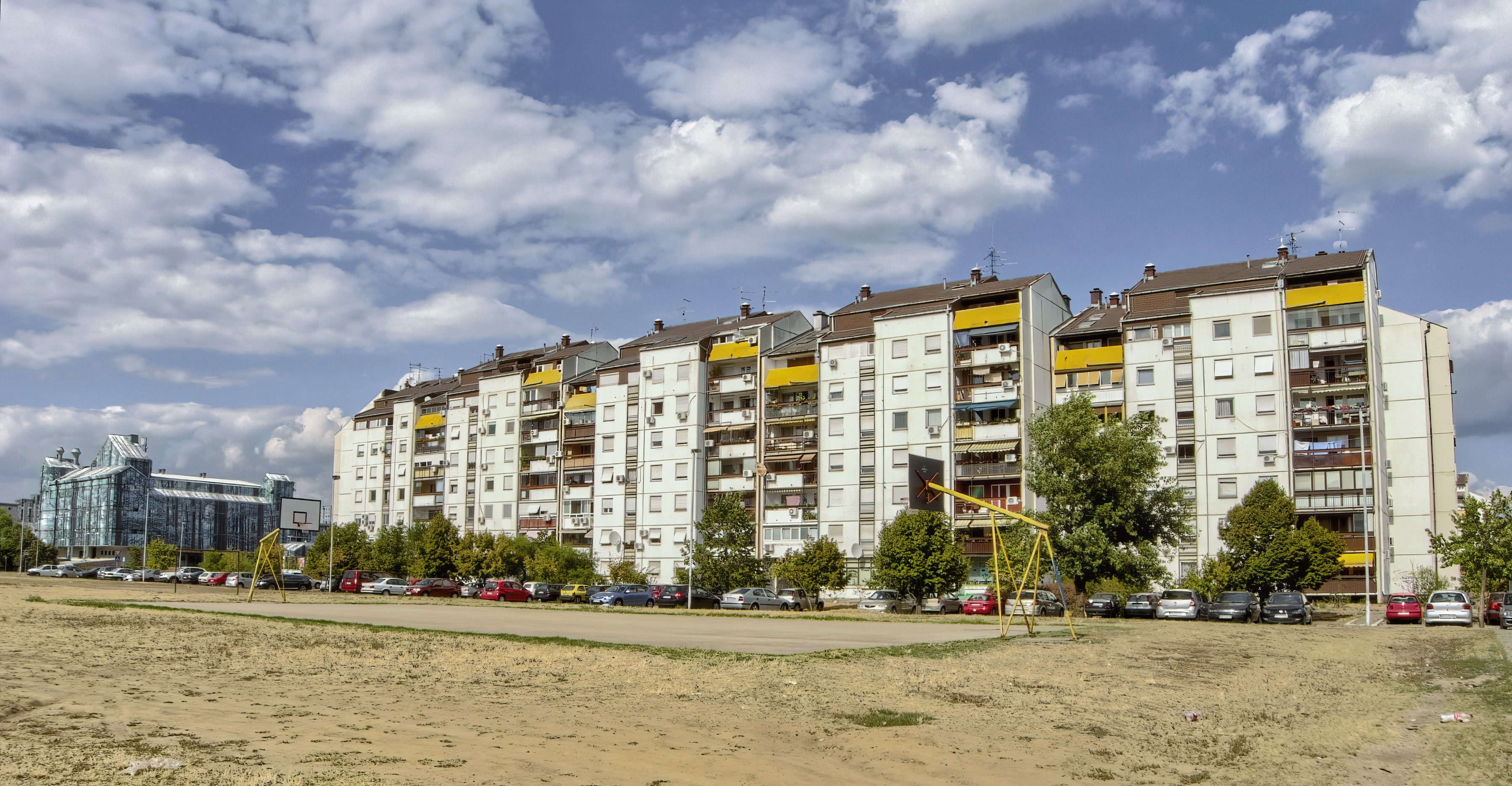 Беле зграде блока 44, кошаркашки терен у првом плану и робна кућа у позадини лево